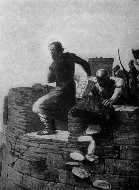 Modesto Brocos (1852-1936) - Defesa de Lugo.